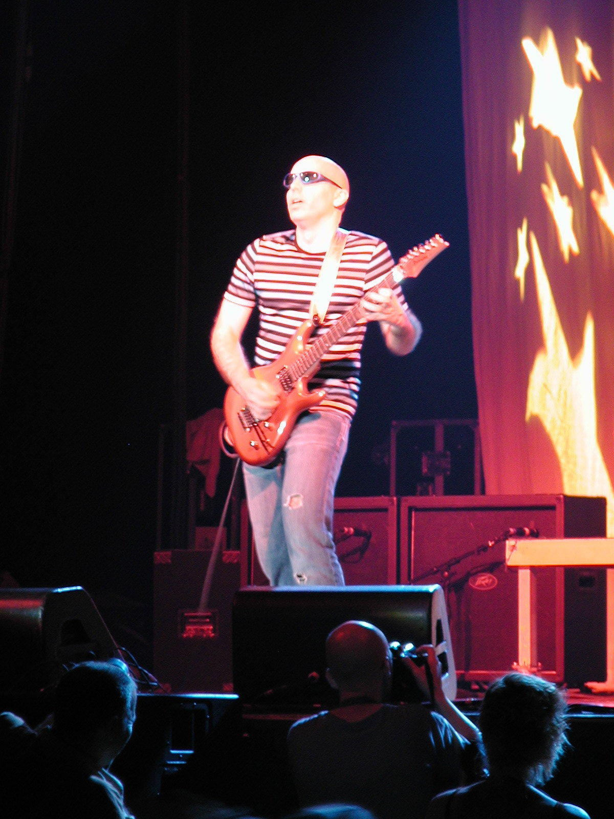 Joe Satriani al G3 di Milano del Giugno 2004. Autore: Enrico Frangi